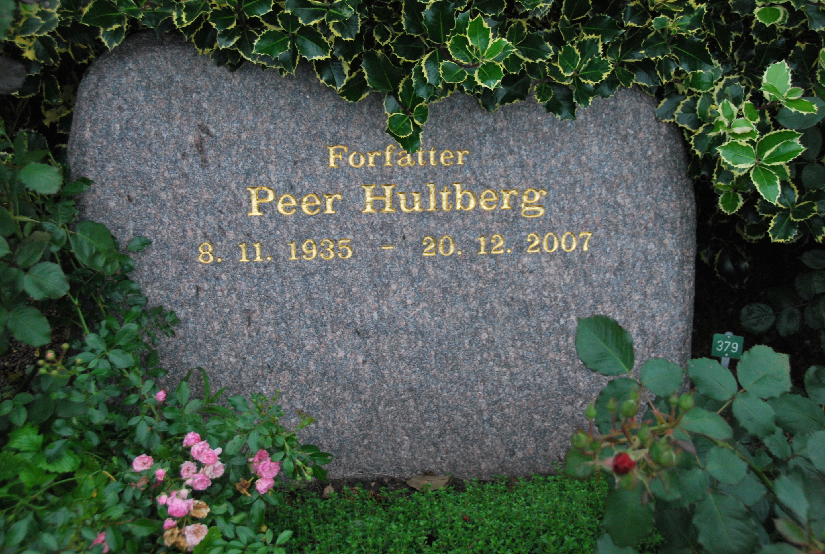 Gravsten for forfatter Peer Hultberg. Placeret på Viborg Kirkegård.